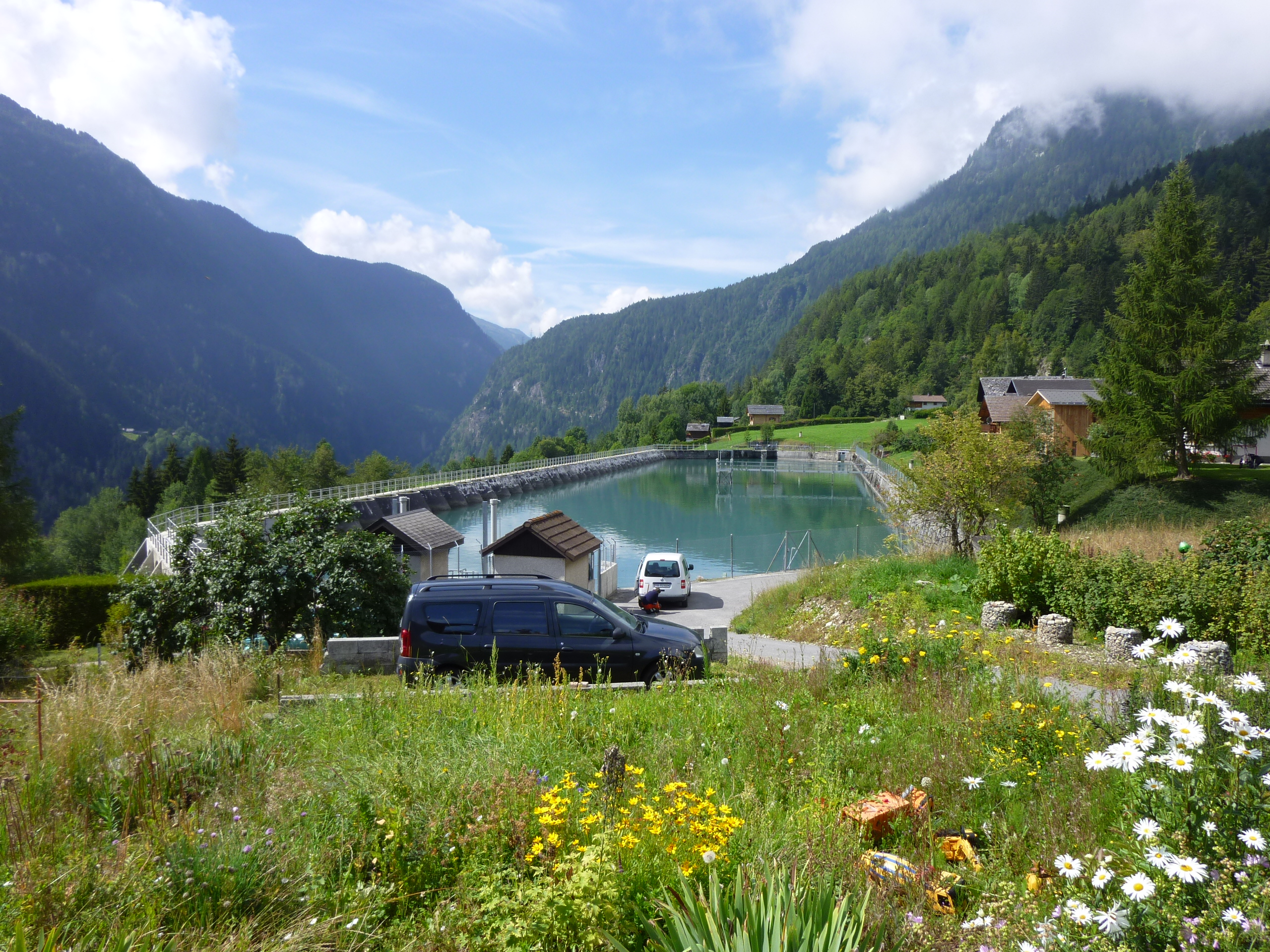 Speicherbecken SBB (Schweizerische Bundesbahn)